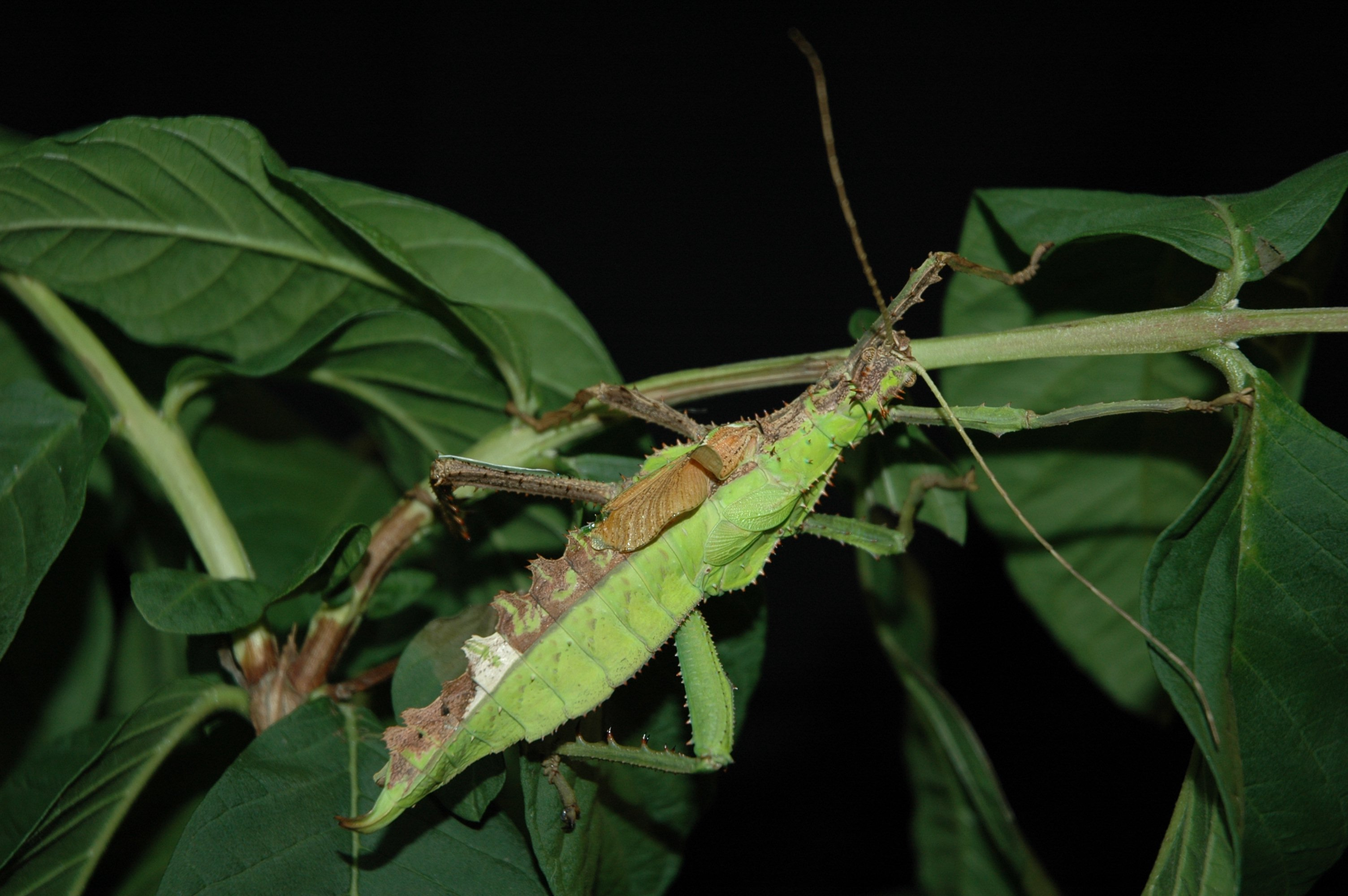 photo de phasme